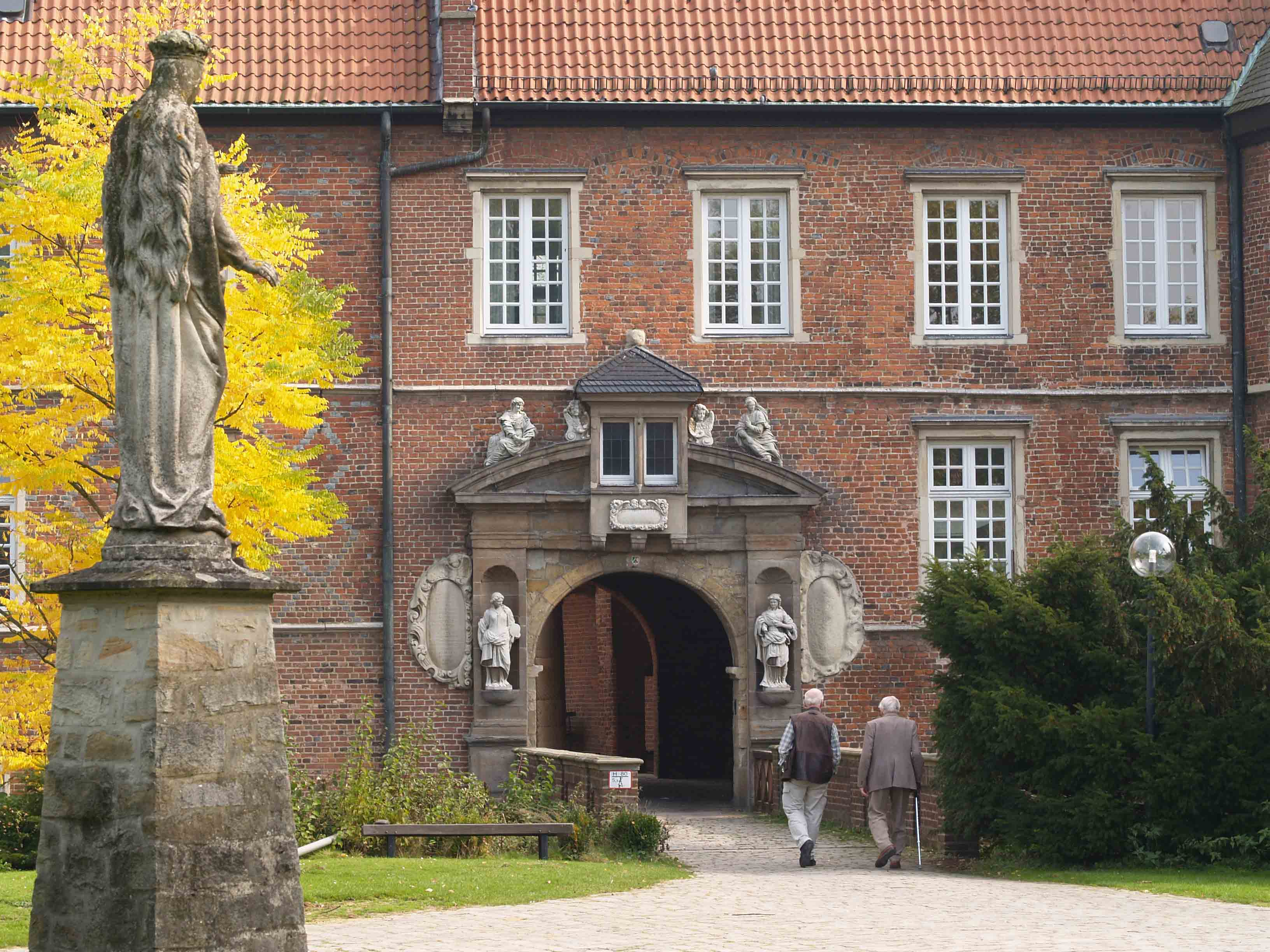 Schloss Herten, Westflügel mit Gräftenbrücke und Eingang